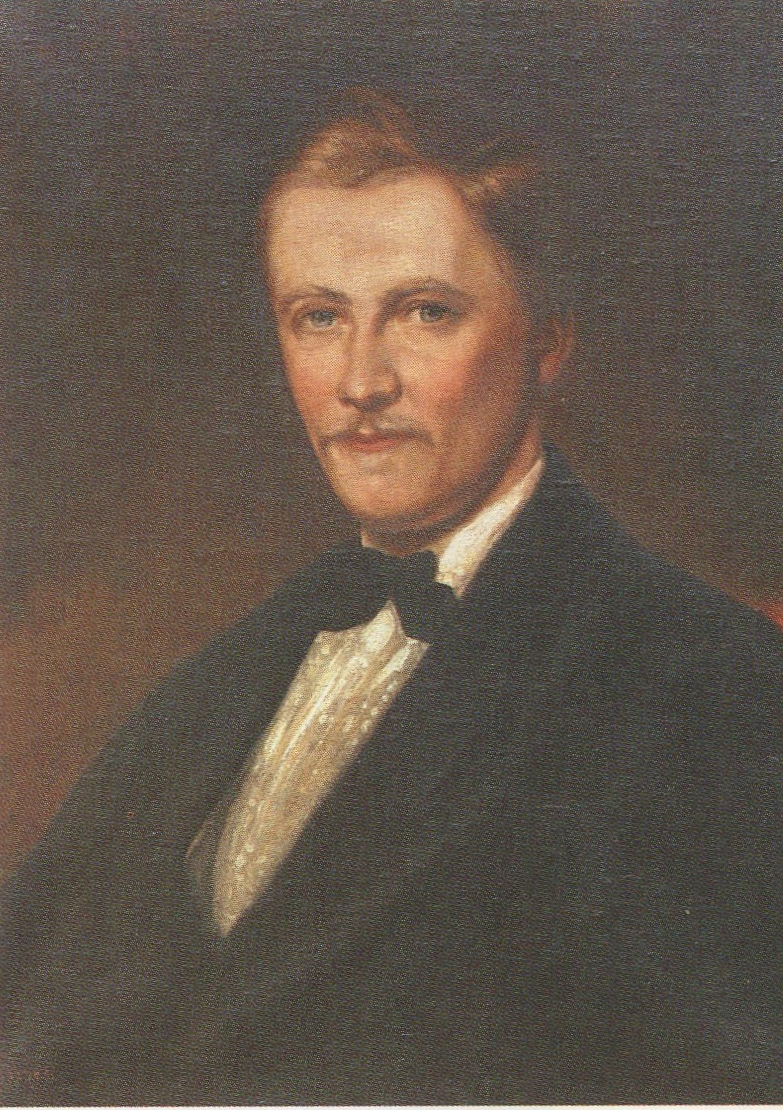 Porträt Eugen Esche (1845-1902)